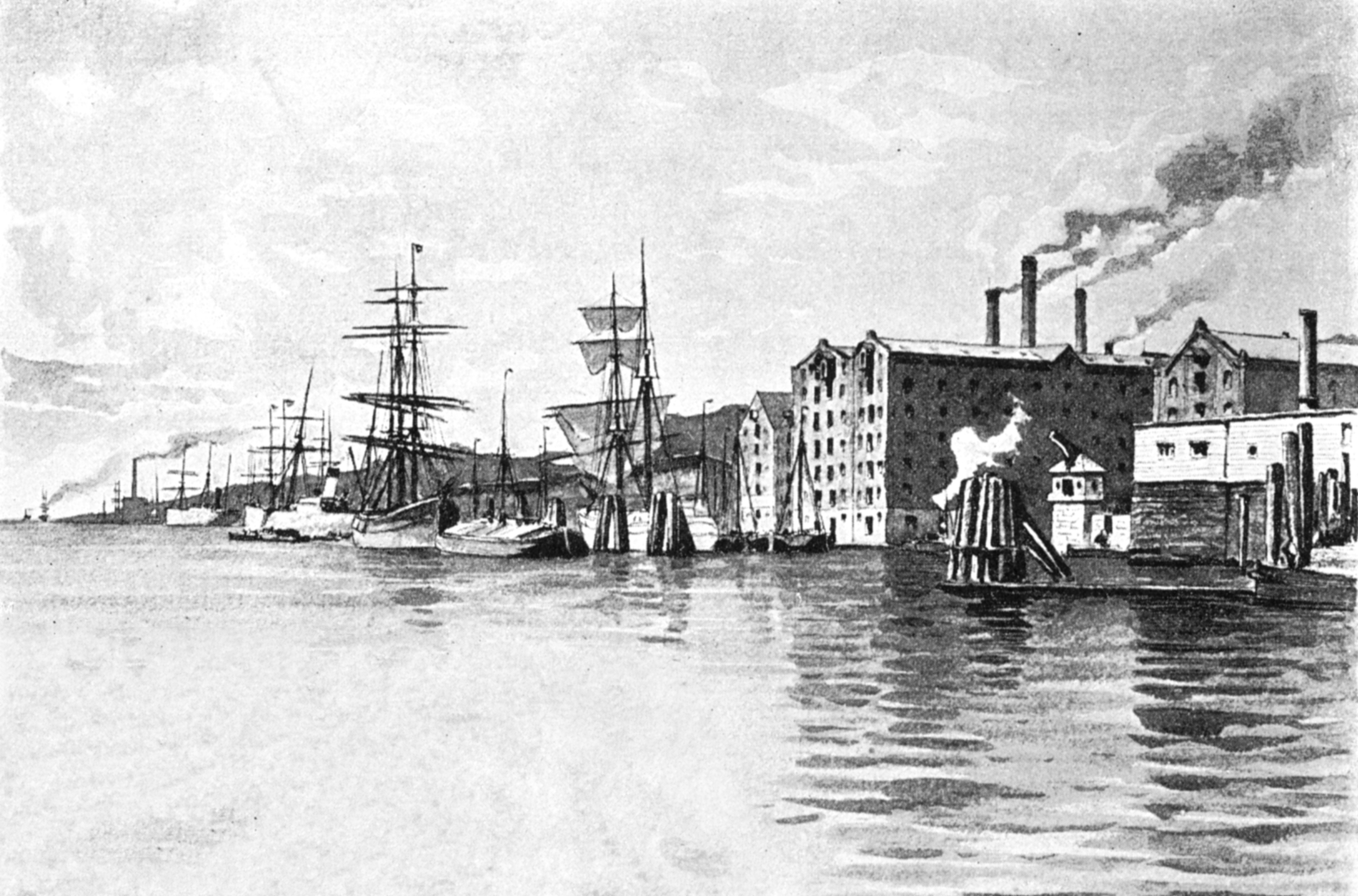 Die Langesche Mühle in Altona an der Elbe, Zeichnung von Georg Burmester um 1895